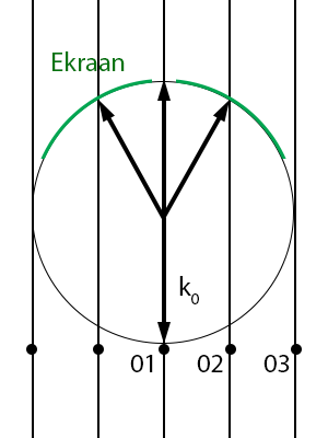 LEED difraktsiooni täppide tekkimine ekraanile Ewald sfääri järgi